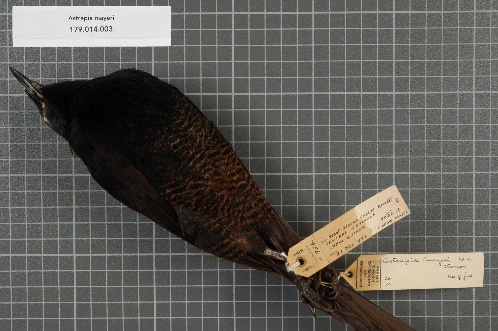 Astrapia mayeri Stonor, 1939